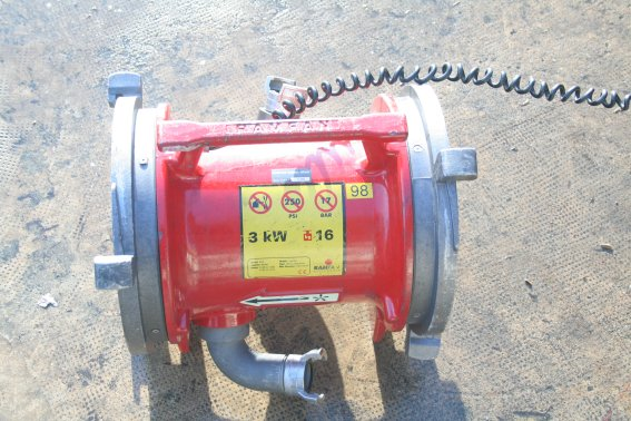 Ventilateur des sapeur-pompiers français